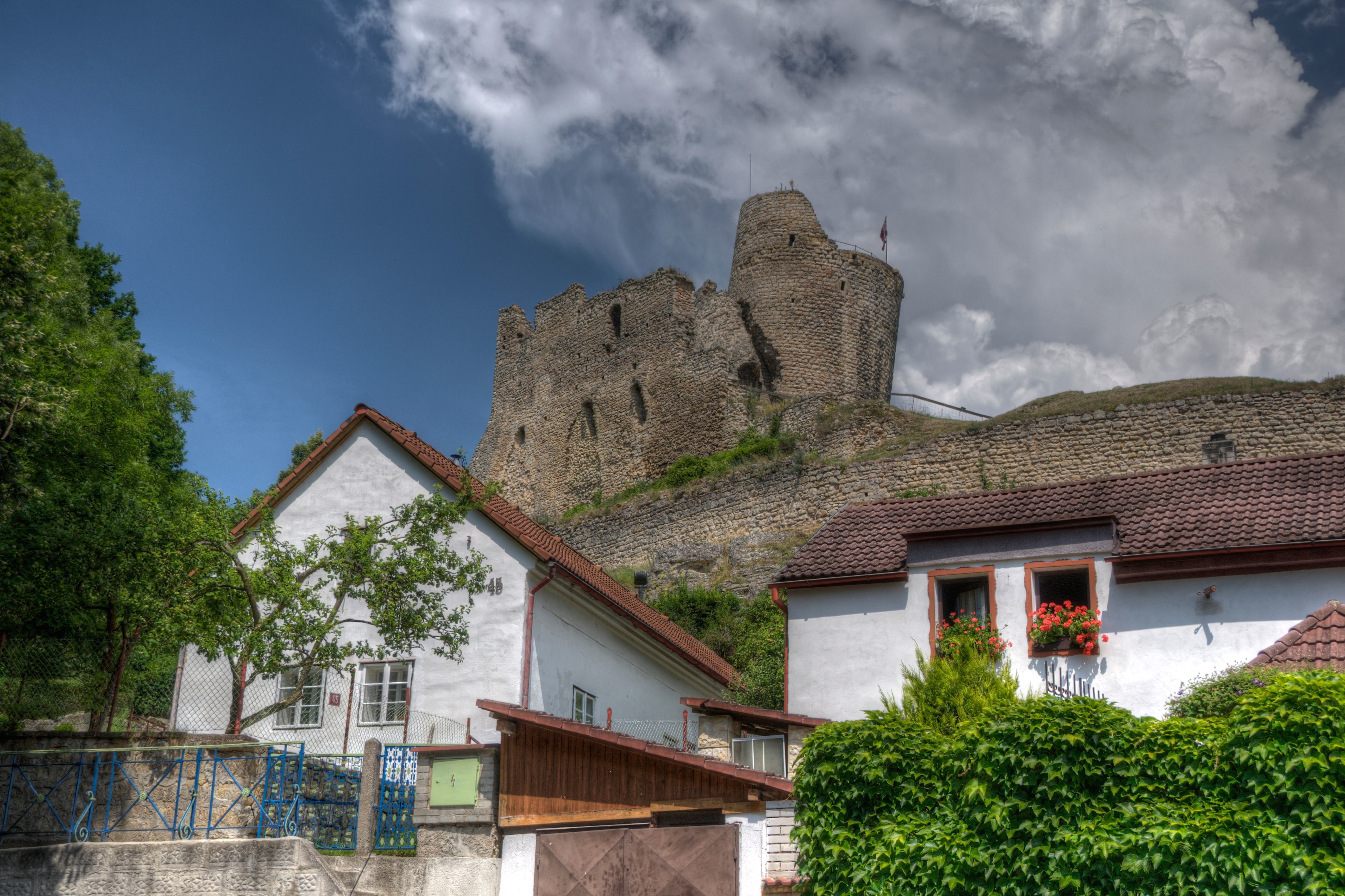 Pohled na hrad od jihu